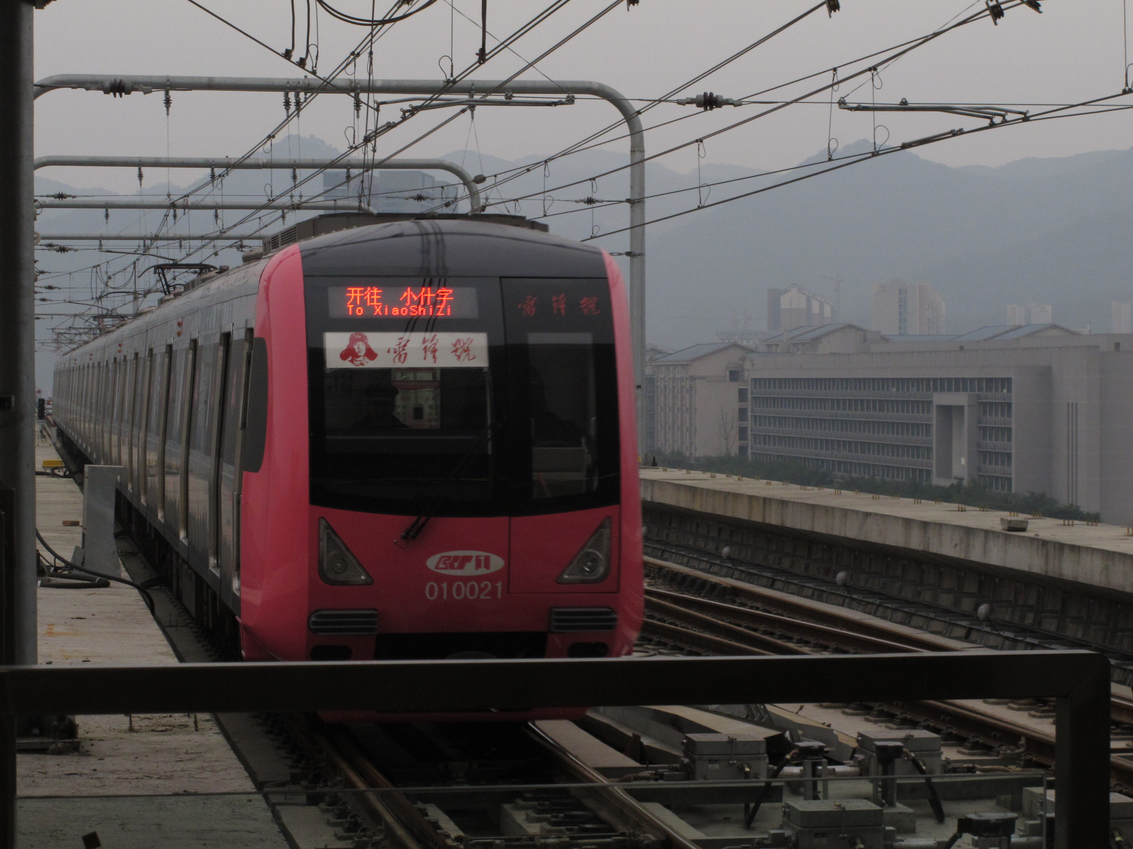 重庆轨道交通1号线 粉色红色涂装车辆混用 此为6号线粉色涂装